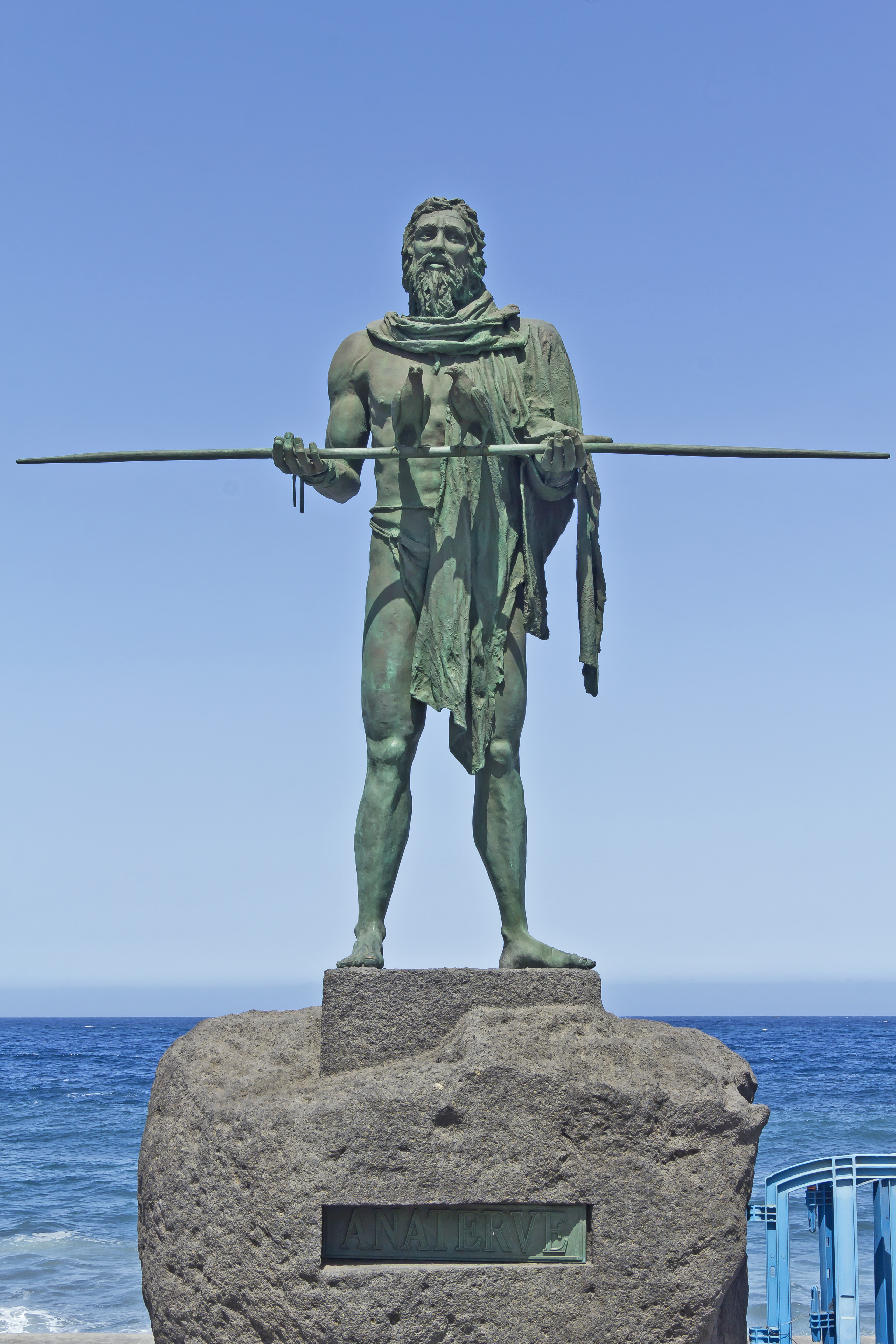 Die Plastik des Mencey Añaterve auf der Plaza de la Patrona de Canarias in Candelaria, Teneriffa, Spanien wurde von José Abad geschaffen.